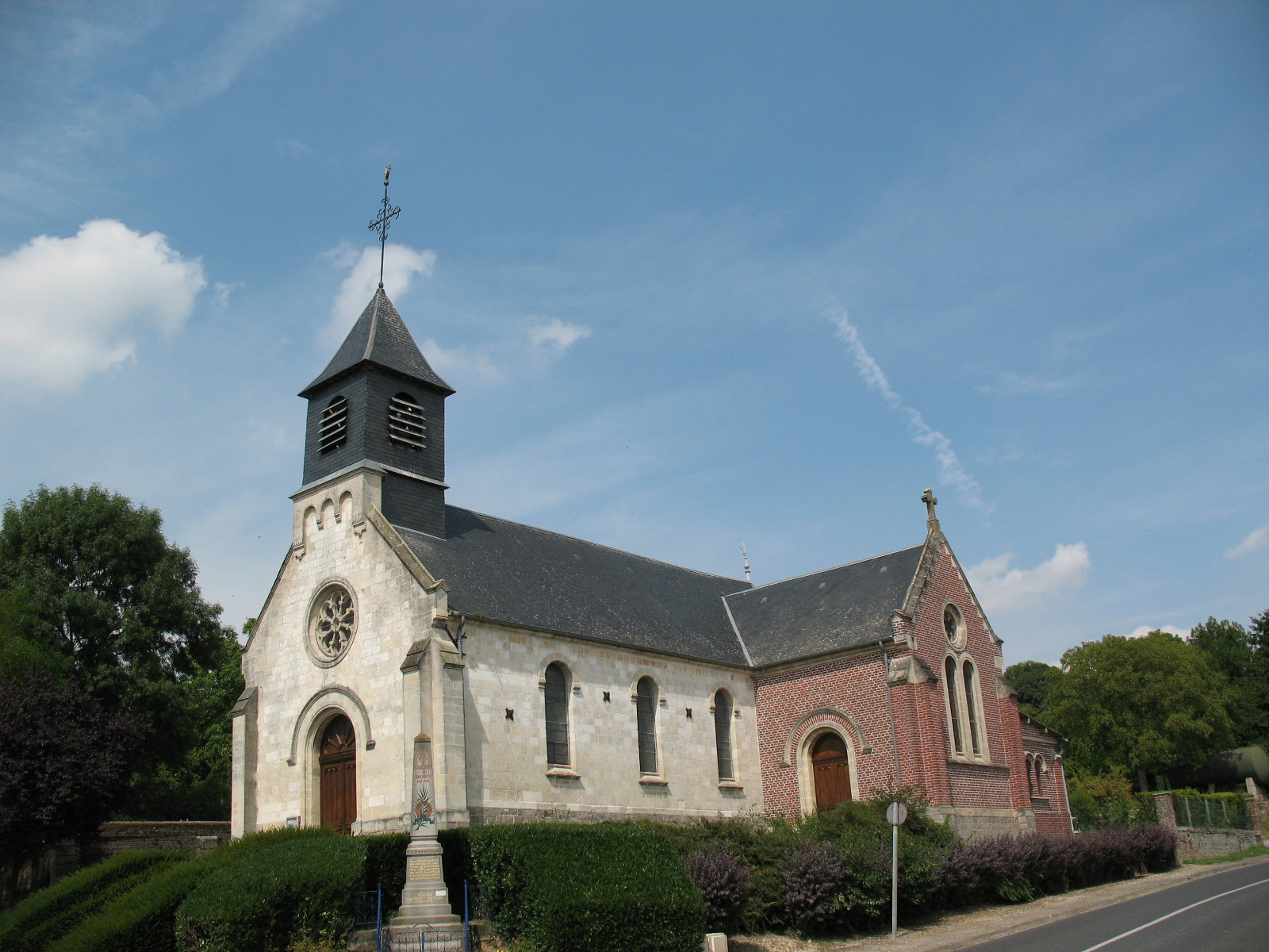 L'église de Beaucourt-sur-l'Hallue, placée sous le vocable de saint Eloi, était un édifice néo-classique du XVIIIe siècle. Il a été profondément remanié en 1873.